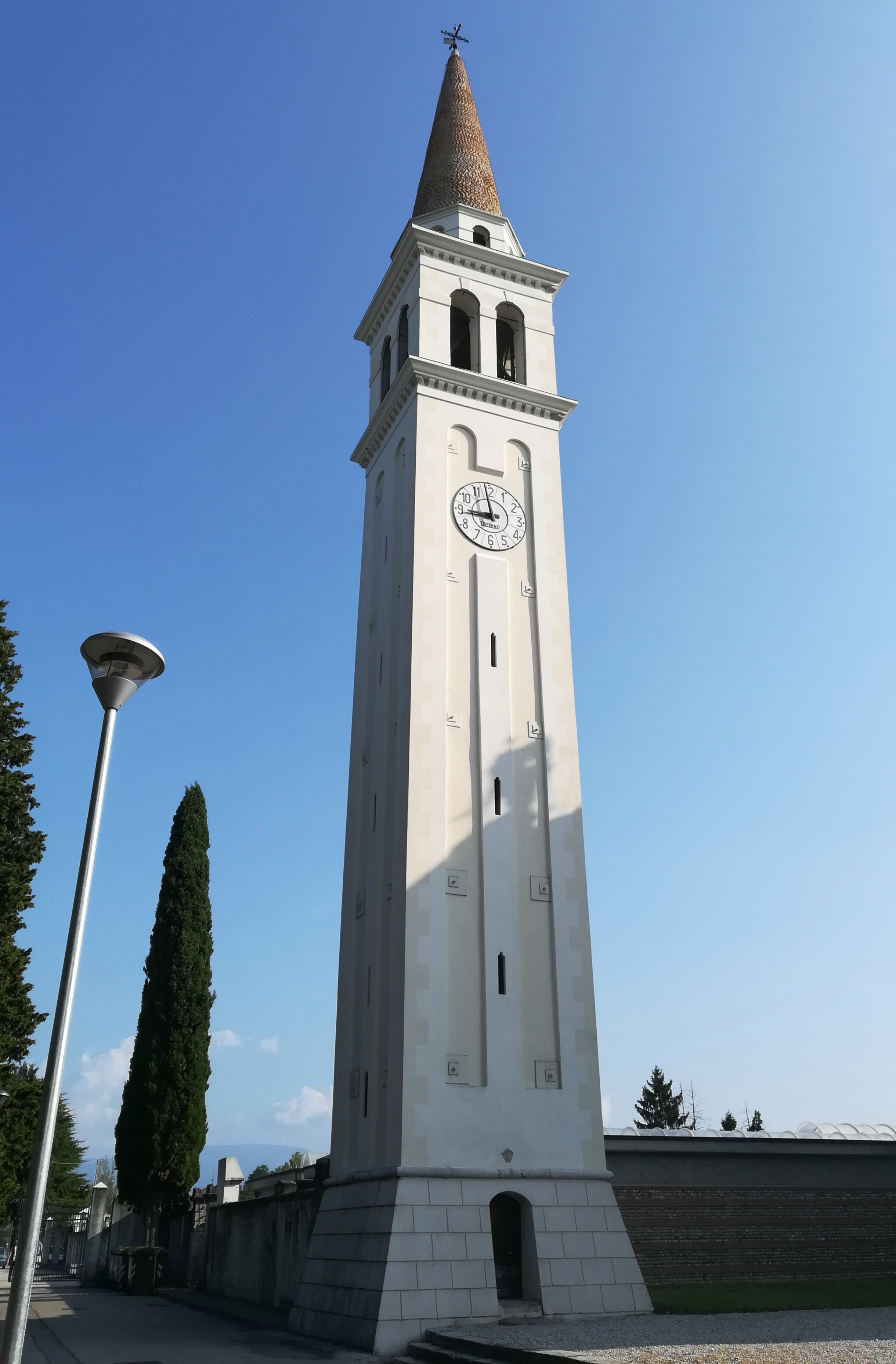 La torre campanaria di Codogné (TV)